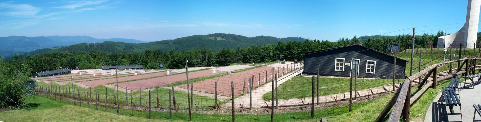 Camp de concentration nazi "Struthof" à Natzweiler